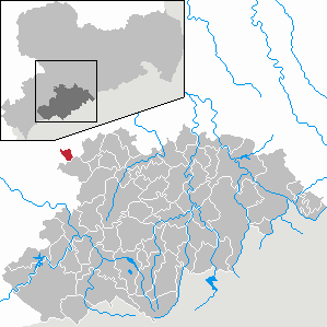 Hohndorf im Erzgebirgskreis, Sachsen